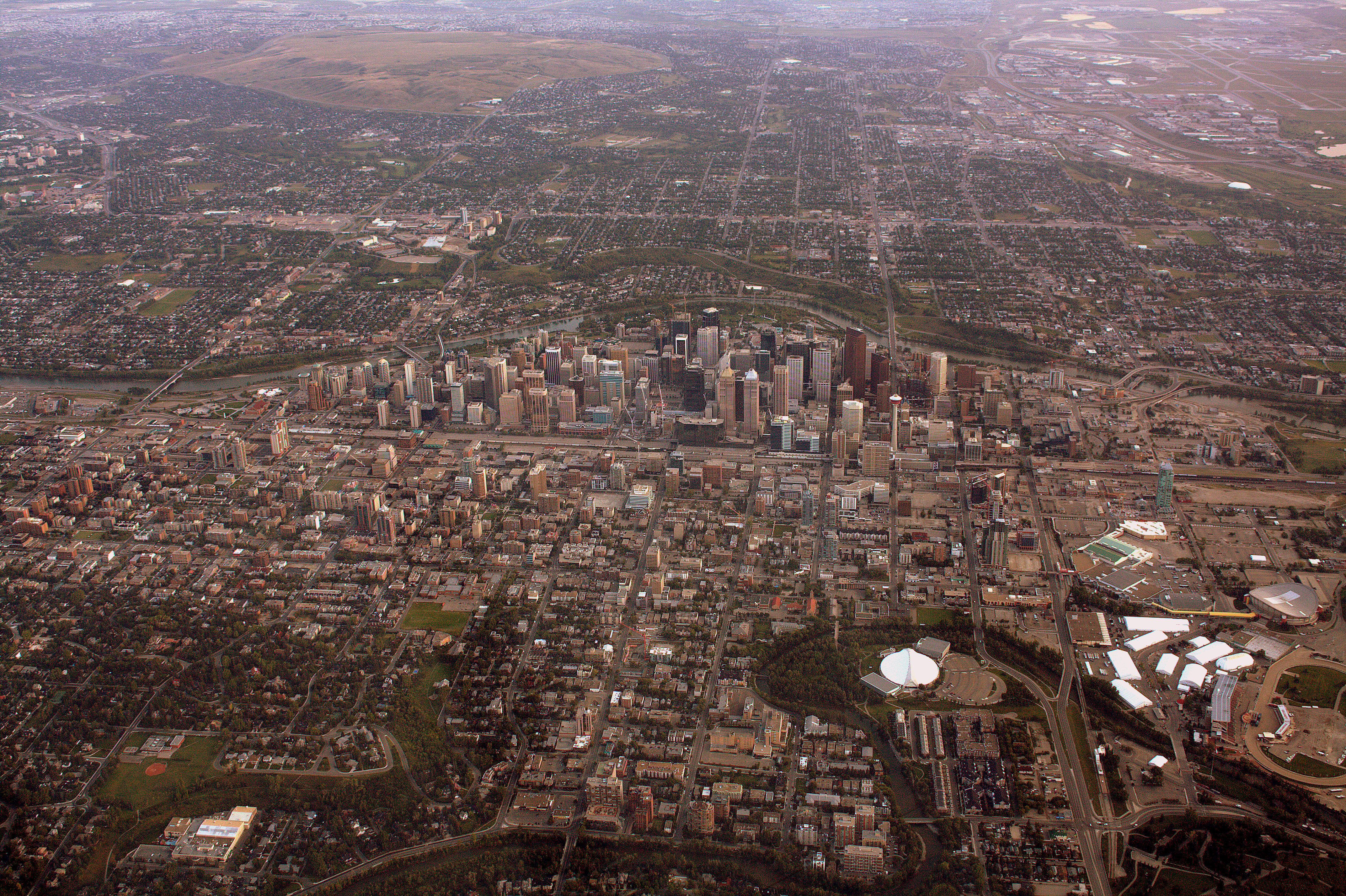 Calgary, AB